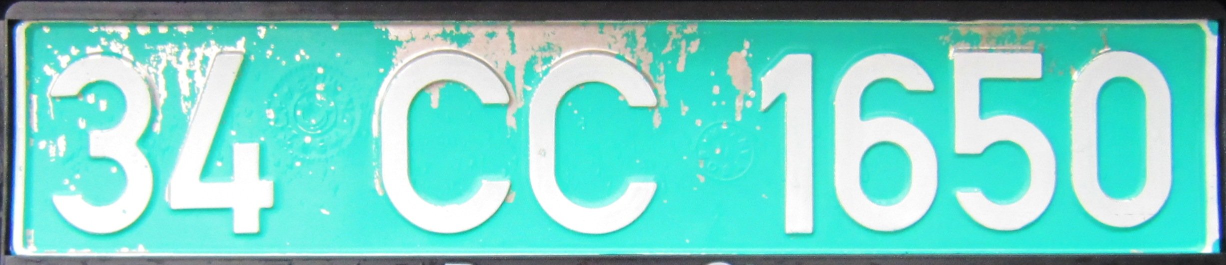 Consulaire kentekenplaat (34 - Istanboel) Turkije